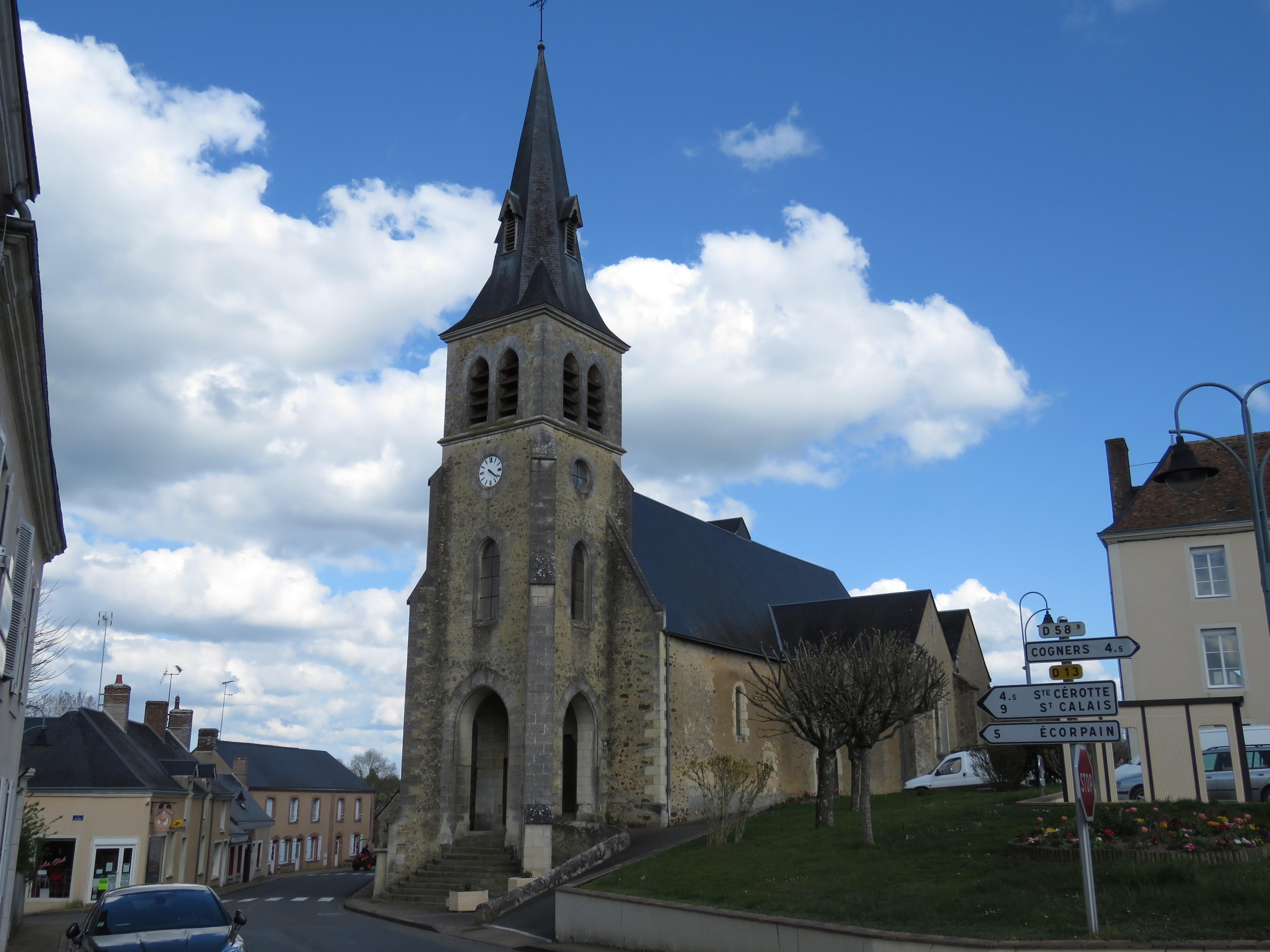 Église d'Évaillé